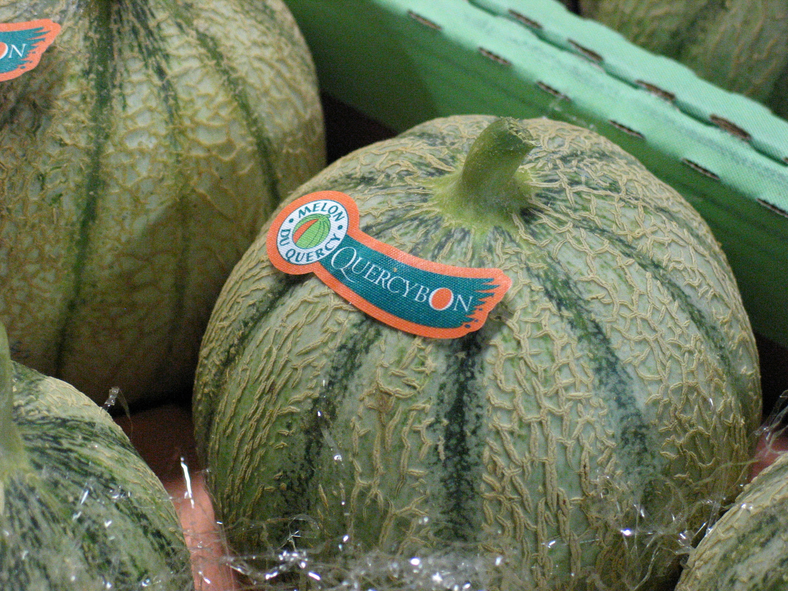 Melon du Quercy étiqueté